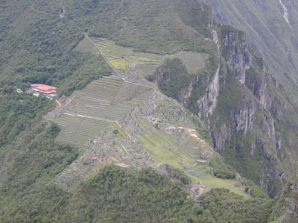 Foto mia personale, panorama di Macchu Picchu visto dalla cima dell'Huayna Picchu, gennaio 2002